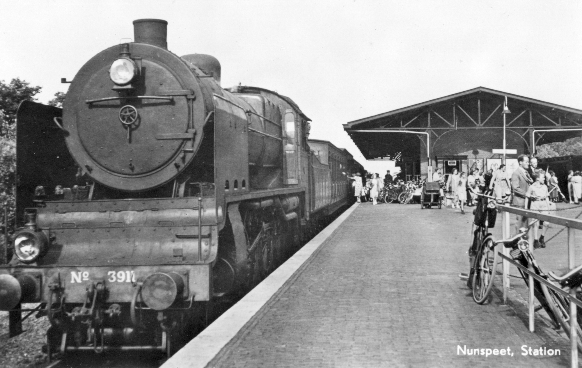 Station Nunspeet met stoomtrein van de NS met loc 3911 (serie NS 3900); circa 1930. Collectie De Pater.